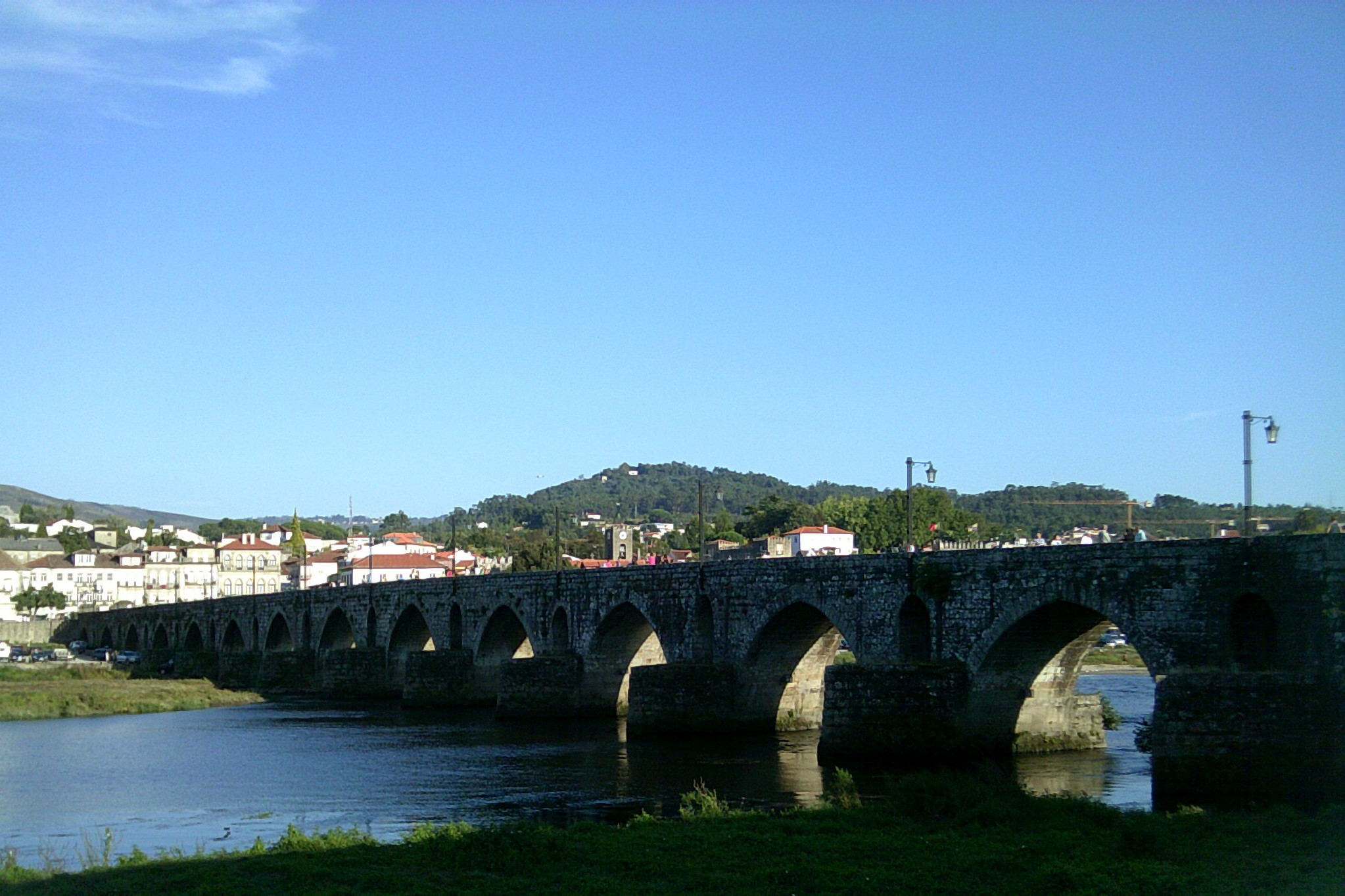 Ponte Velha sobre o rio Lima, freguesia e vila de Ponte de Lima, distrito de Viana de Castelo, Portugal.